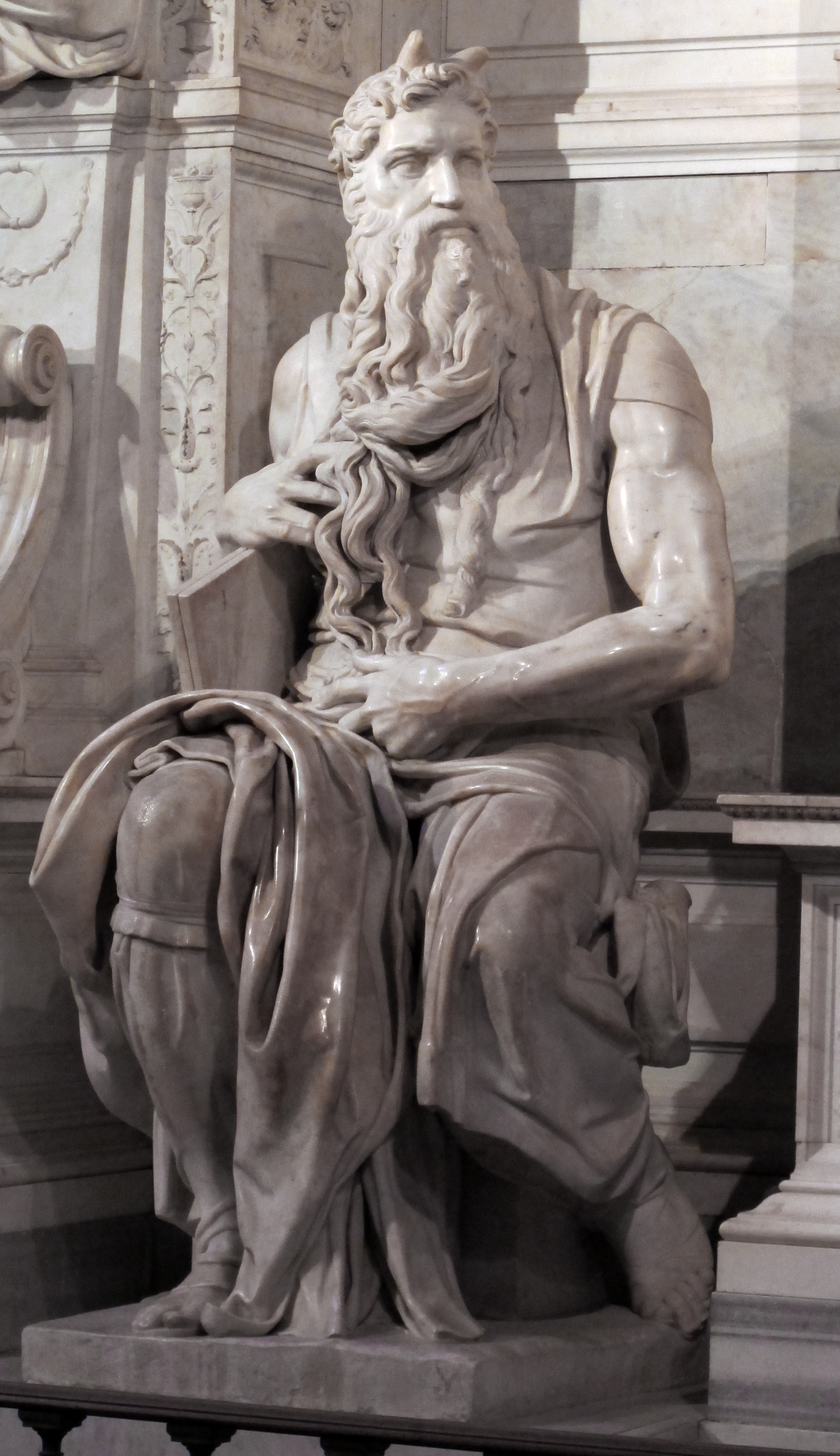 San pietro in vincoli, monumento a giulio II, mosè